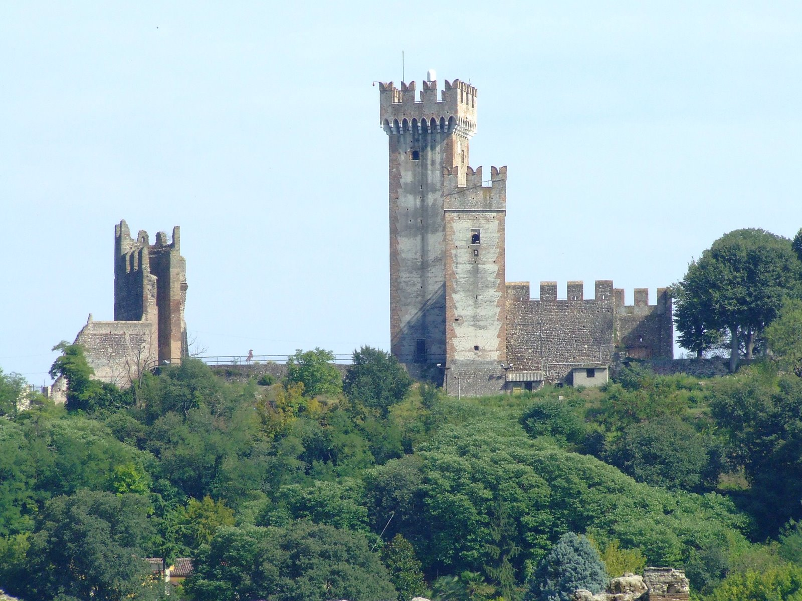 castello Visconteo a Valeggio sul Mincio